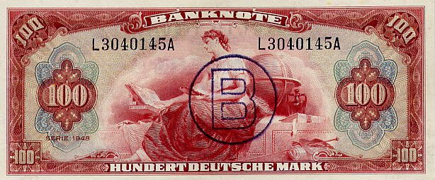 100 Deutsche Mark 1 series, Berlin stamp. averse